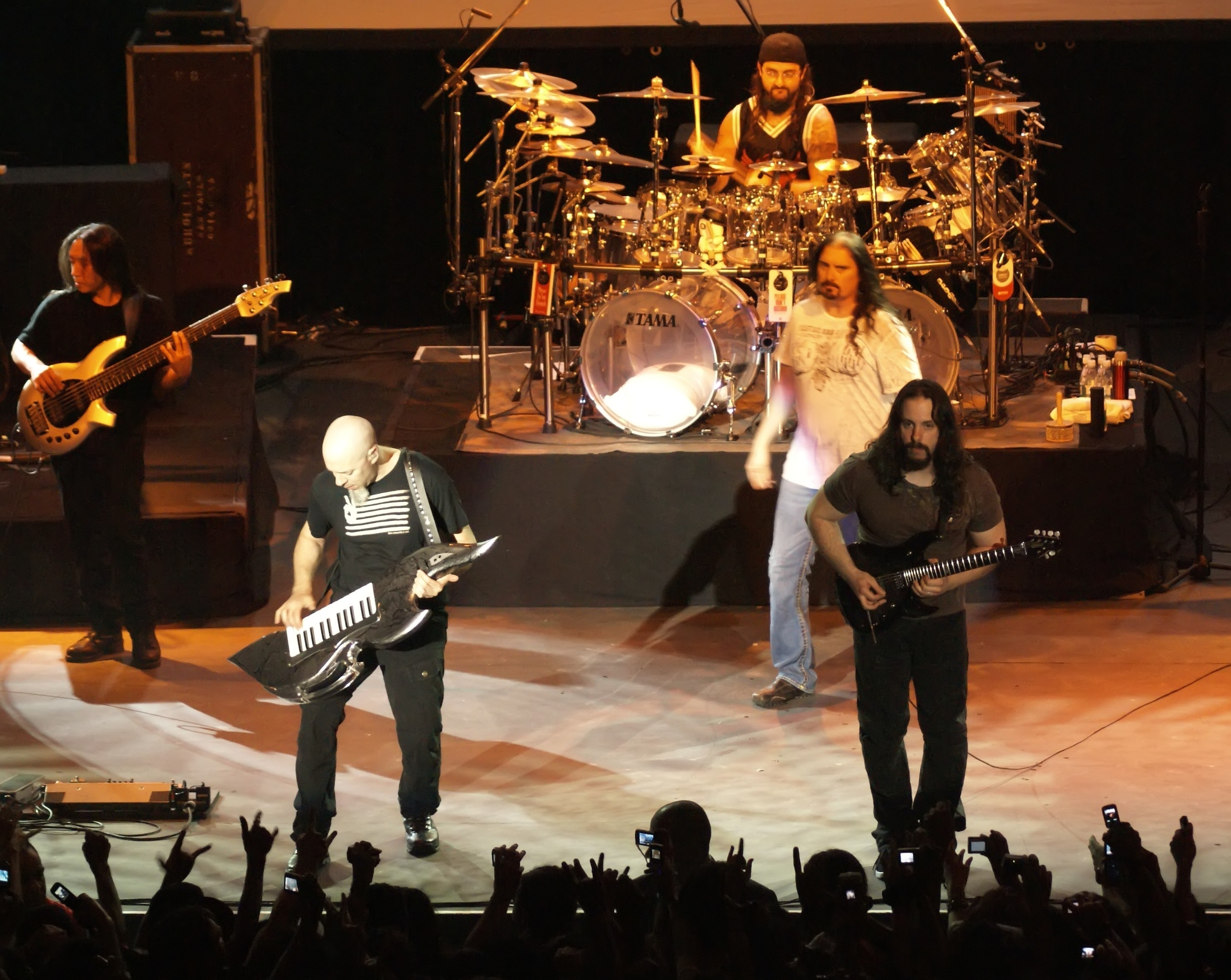 Show Dream Theater no Rio de Janeiro dia 07/03/2008 Fotos tiradas do camarote central.